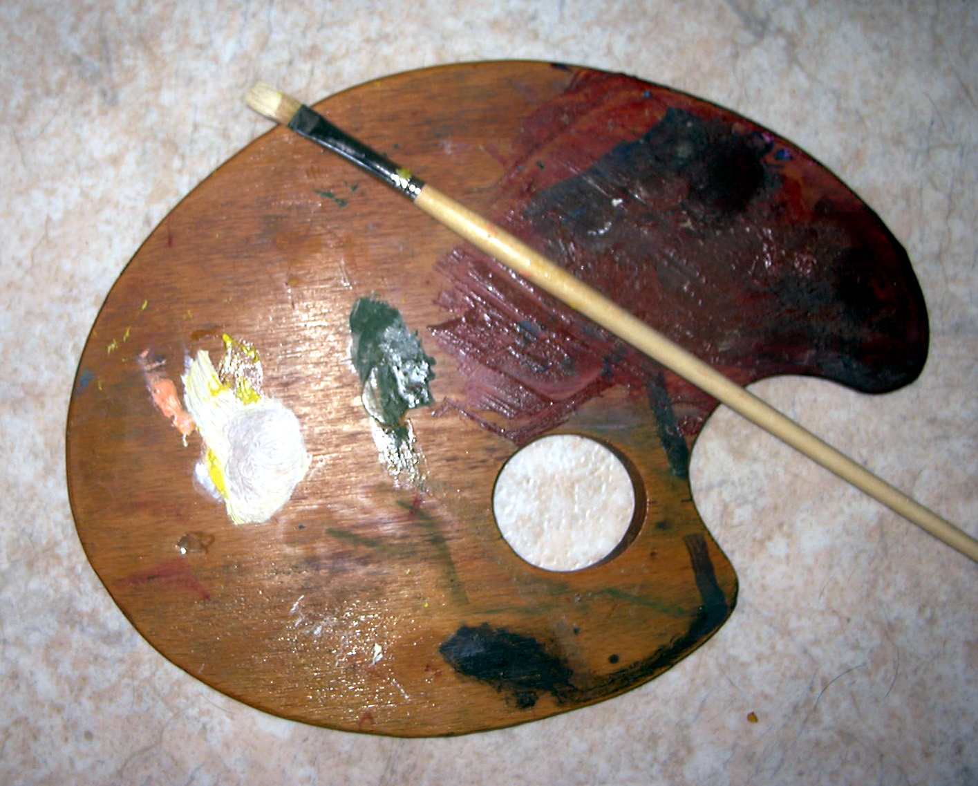 An artist's palette.